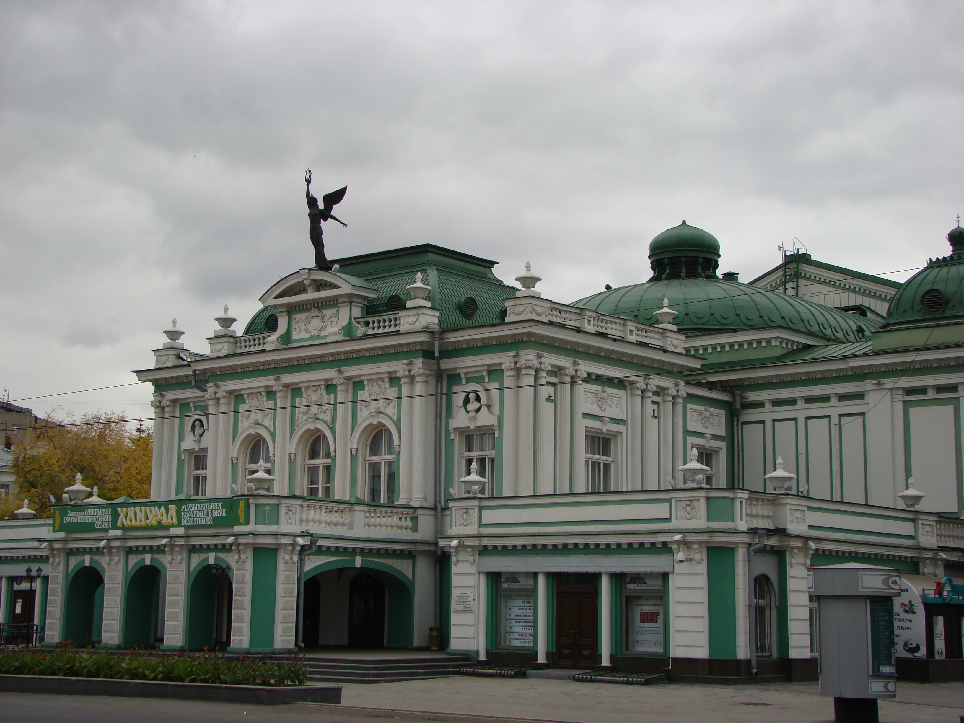 Городской театр на Базарной площади